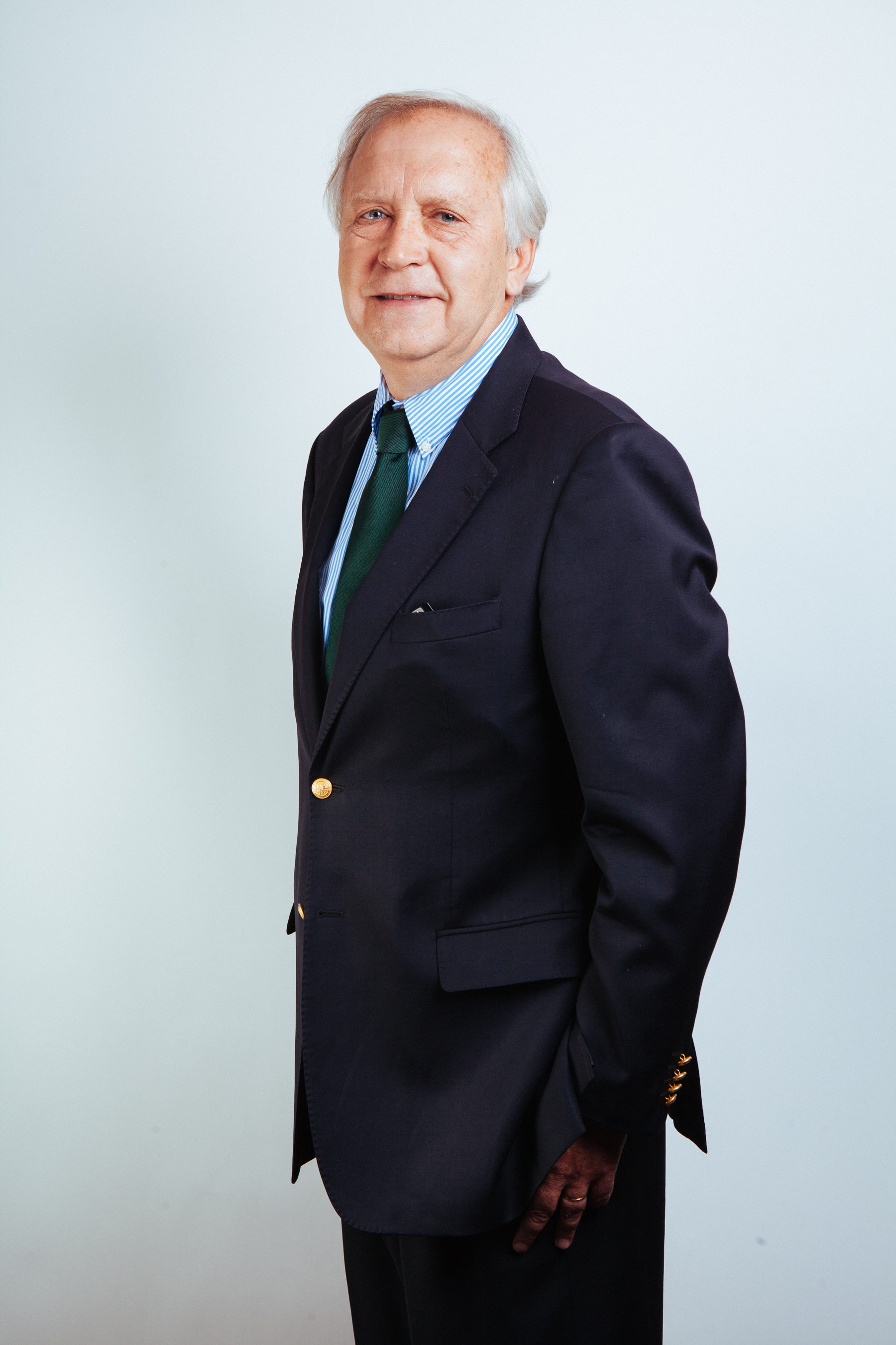 Ministro de Estado del segundo gobierno de Michelle Bachelet (2014-2018)